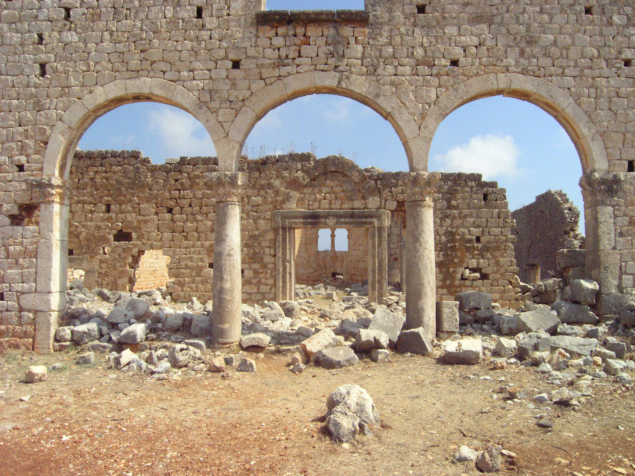 Kanytelleis (türkisch Kanlıdivane), Byzantinische Basilika 1 - dreiteilige Bogenöffnung zum Narthex, Blick durch das Portal zum Kirchenraum bis zum Zwillingsfenster der Apsis